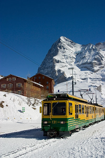 Wengneralpbahn auf der Wengneralp mit Eiger